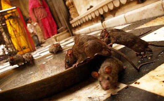 Rats (poètes réincarnés) au temple de Karni Mata à Deshnok.